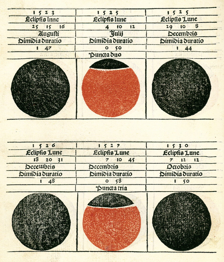 Blatt aus dem Kalendarium des Johannes Regiomontanus, gedruckt Augsburg, Erhard Ratdolt, 1499.